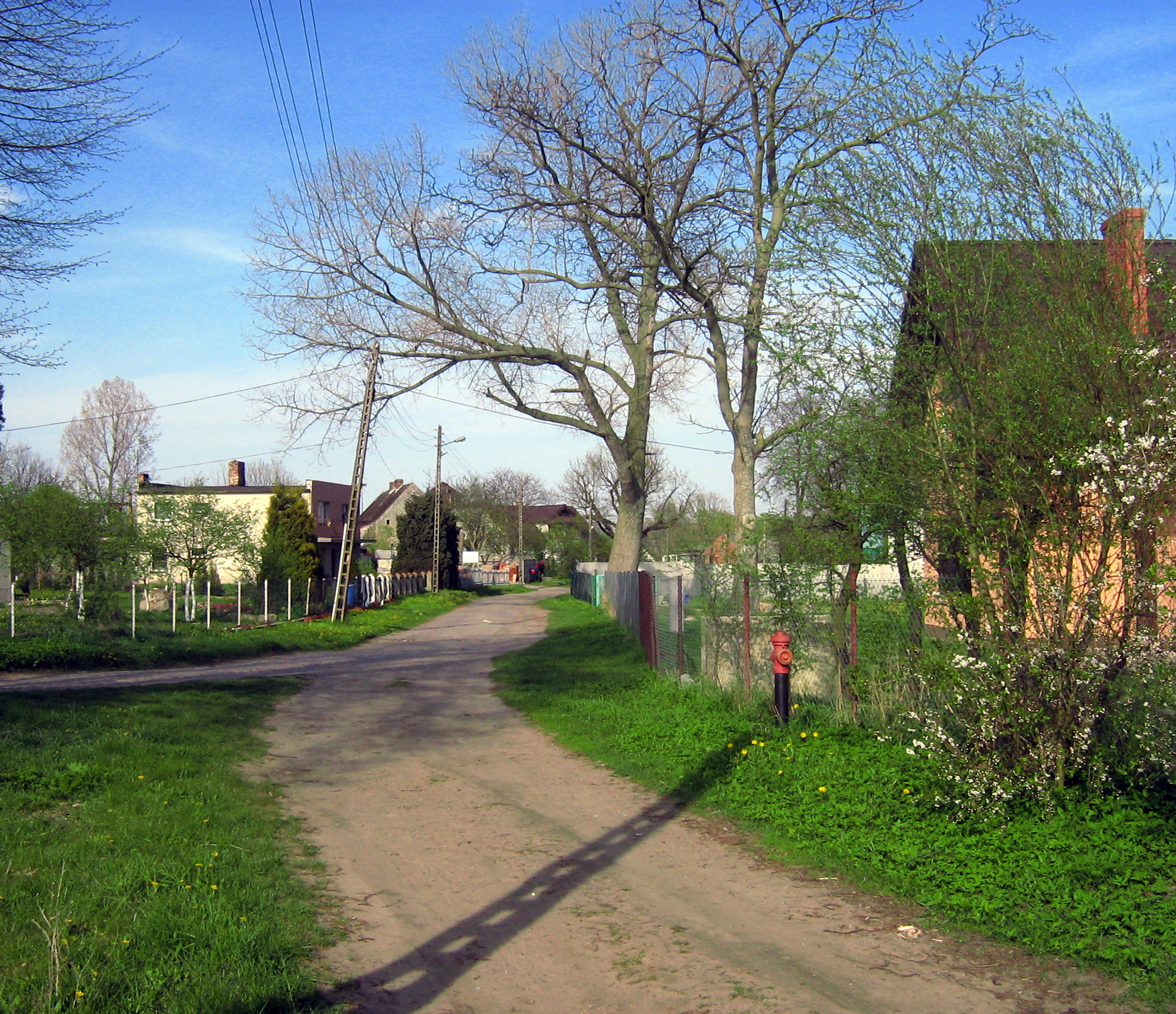 Droga w Zastaniu